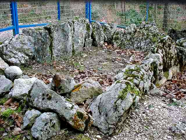 Dolmen - Aesch - Kanton Baselland - Schweiz